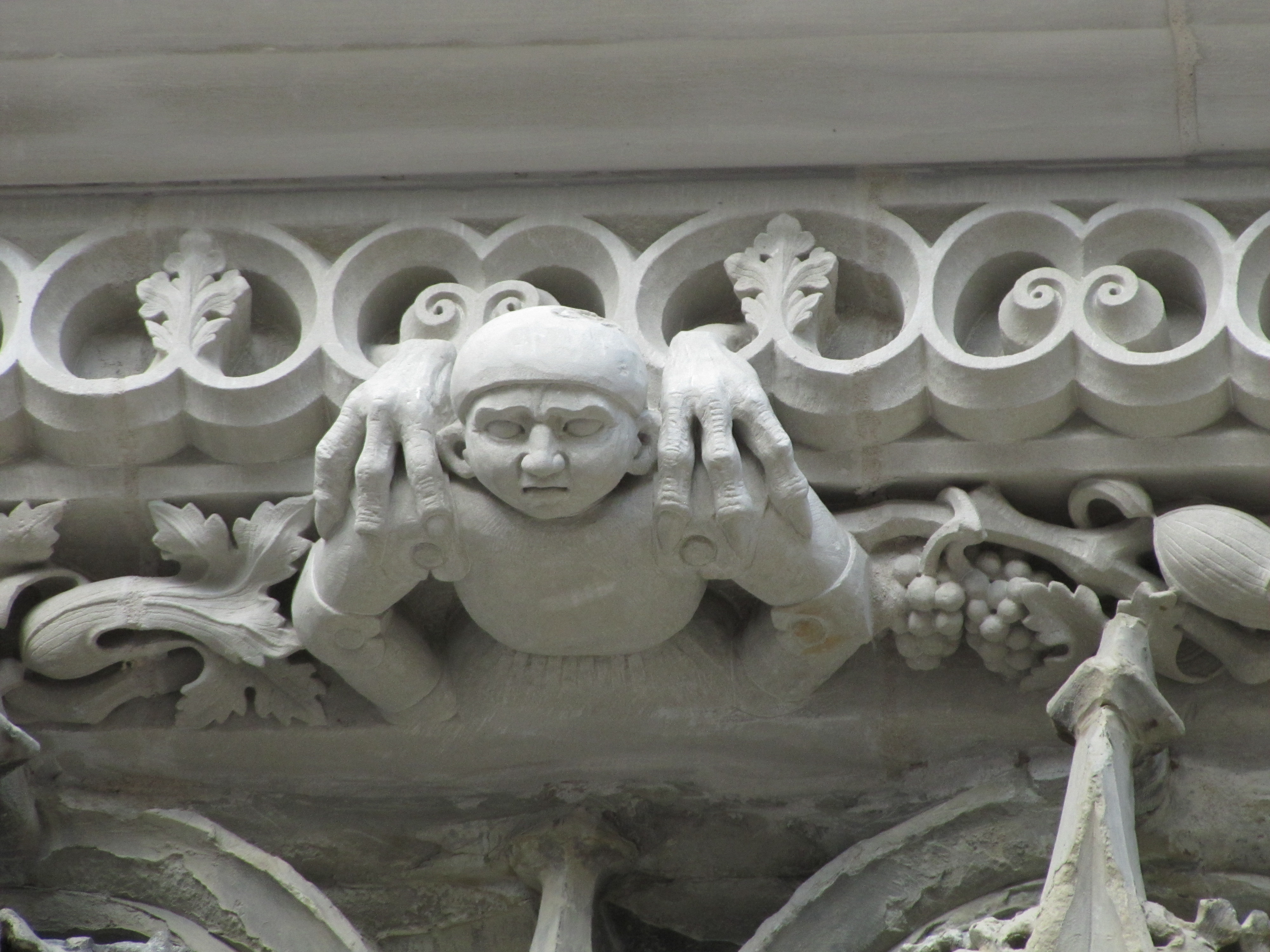 La cathédrale de Chambéry, à l'origine couvent des Franciscains (15ème siècle). Détail de la façade gothique flamboyant.